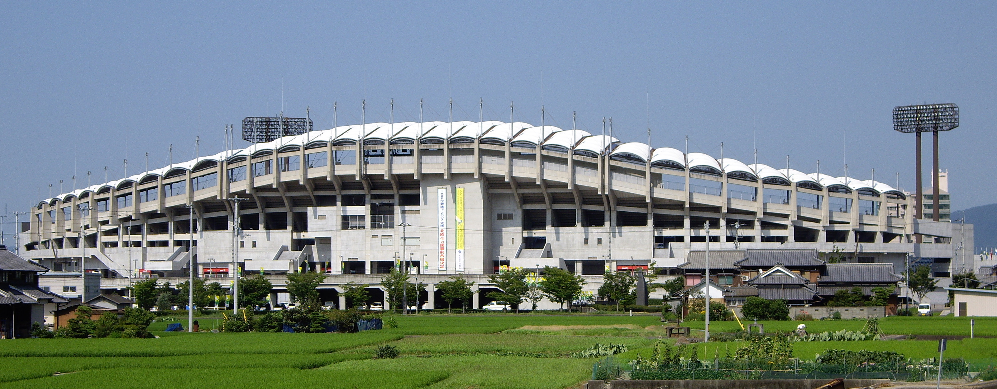 香川県立丸亀競技場（全景） - 日本国香川県丸亀市